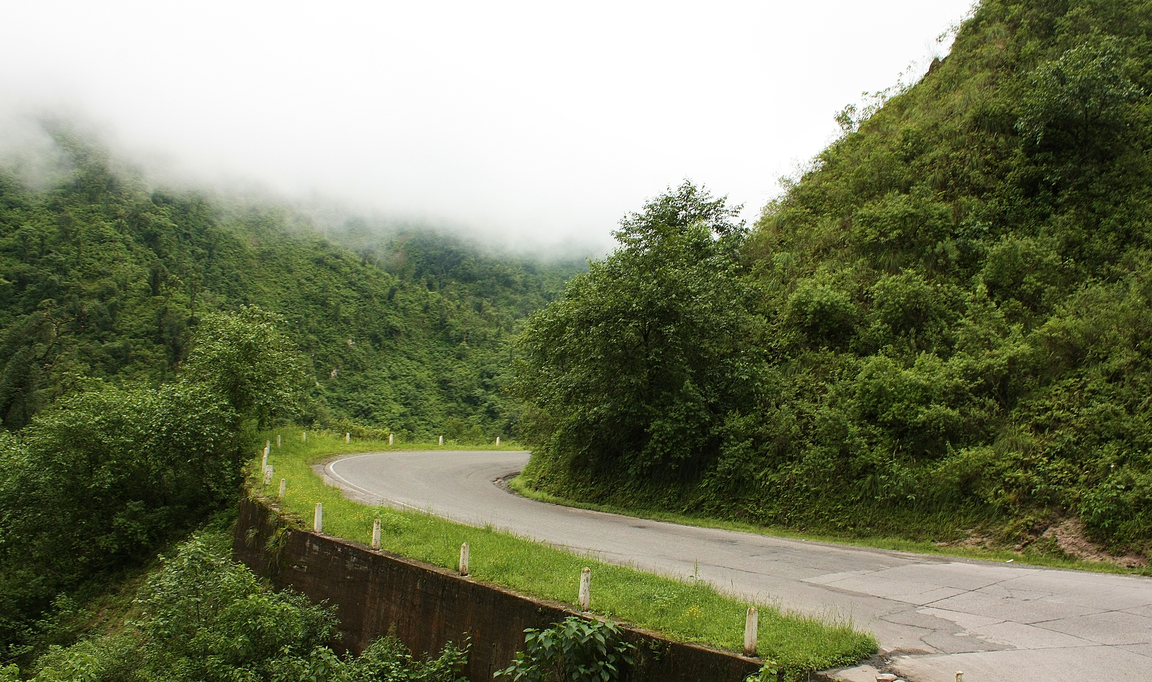 Selva en Tucuman